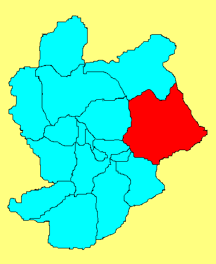 赤城县在张家口市的位置；此图片由王云峰wangyunfeng原创，用于WIKI。